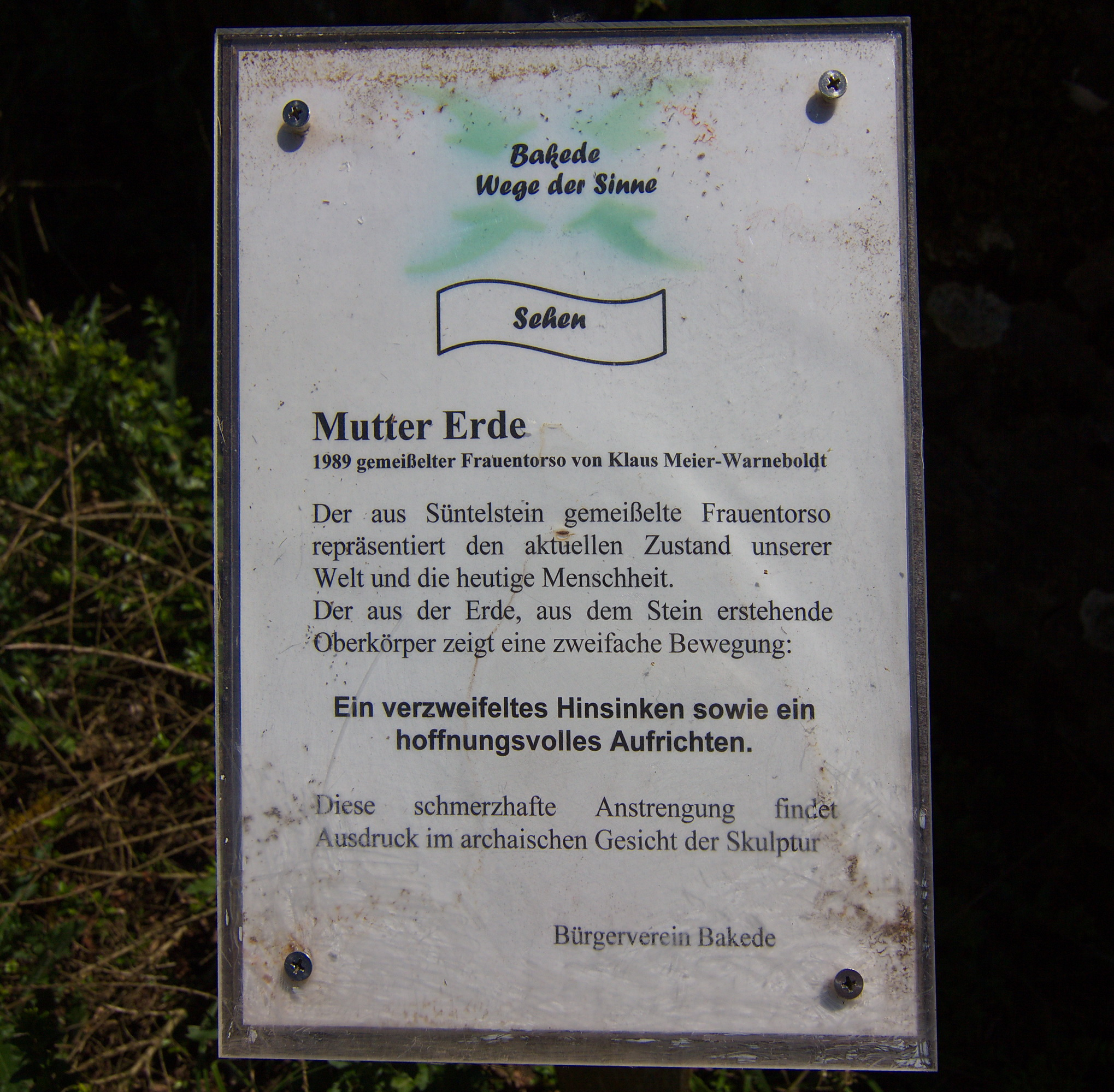 Skulptur "Mutter Erde" (1989), ein gemeißelter Frauentorso von Klaus Meier Warneboldt in Bakede (Bad Münder), Niedersachsen, Deutschland.